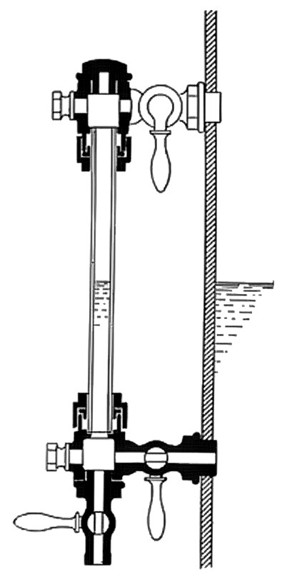 Boiler watergauge (Heat Engines, 1913).jpg